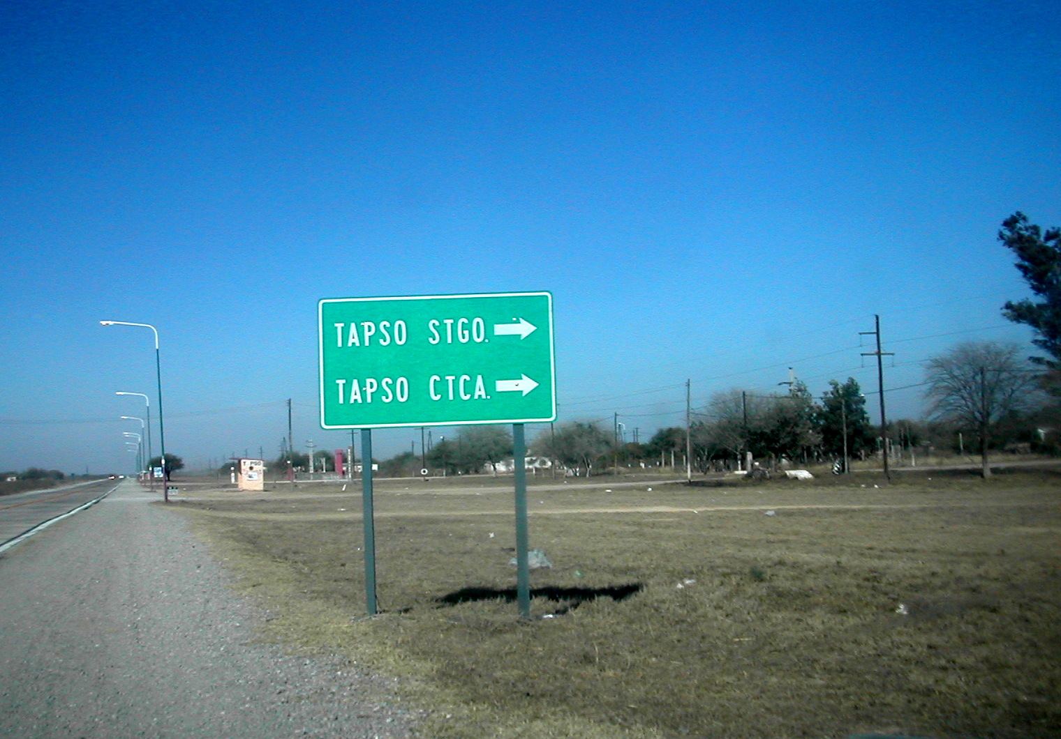 esto es sobre ruta 157. cartel indicador de ciudades